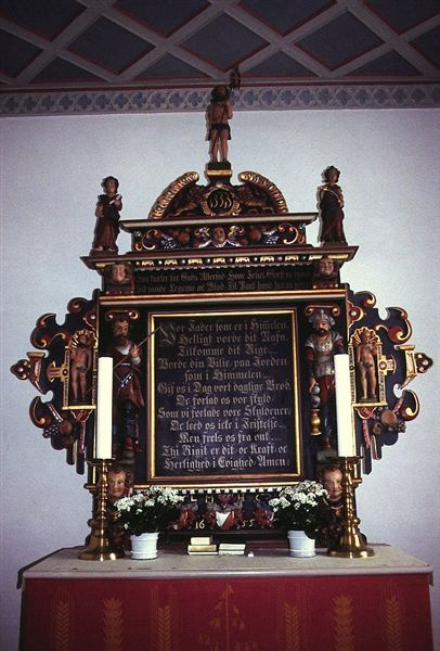 Altertavle Skorup kirke er en kirke i Silkeborg Provsti (Århus Stift). Sognet ligger i Silkeborg Kommune, (før 2007 Gjern Kommune); indtil Kommunalreformen i 1970 lå det i Gjern Herred (Skanderborg Amt). Apsis, kor og skib er opført i romansk tid af granitkvadre